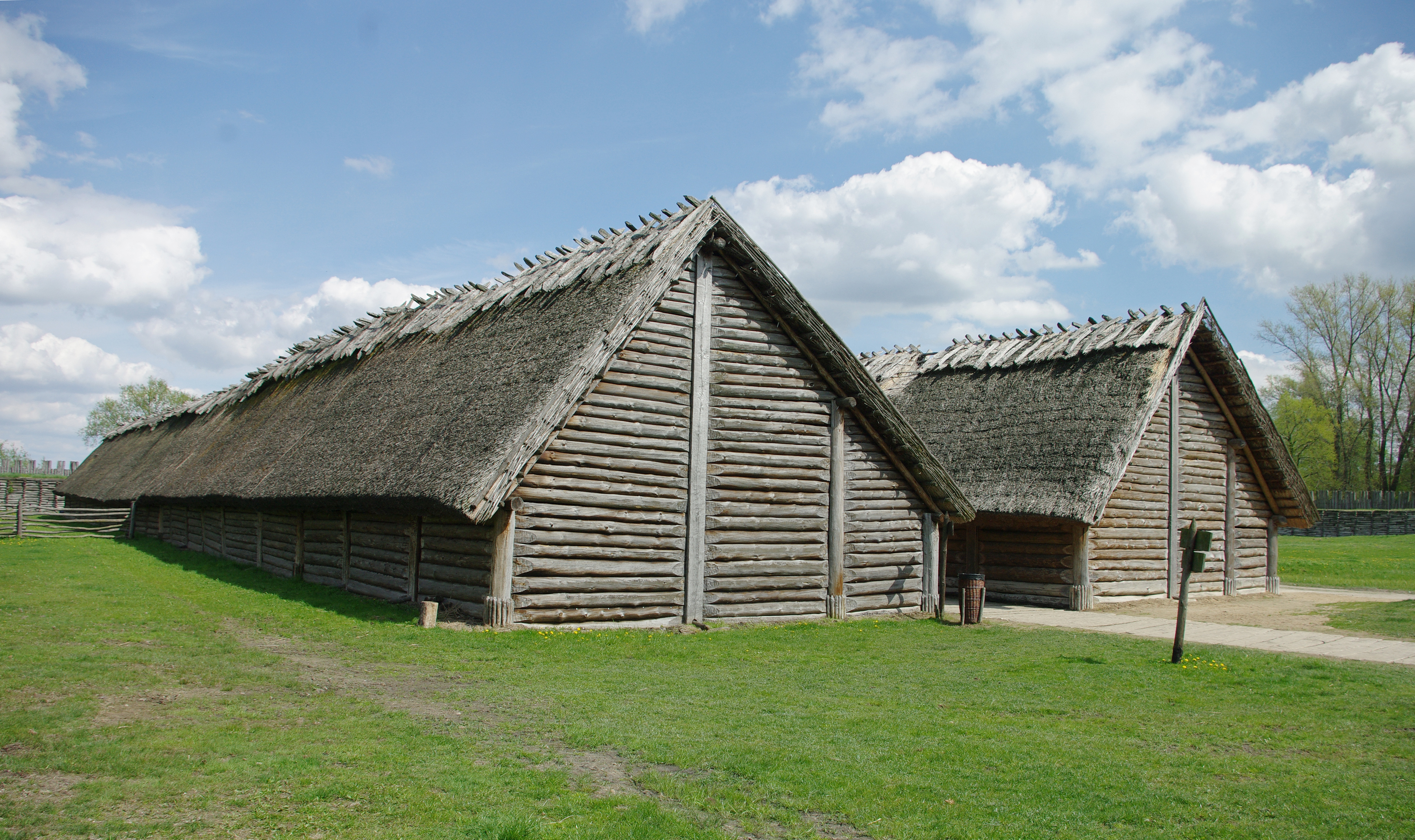 Stanowisko archeologiczne w Biskupinie - chaty (rekonstrukcja)